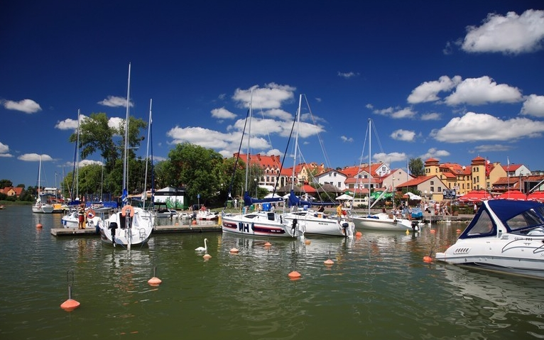 Mikołajki - miasto w woj. warmińsko-mazurskim, w powiecie mrągowskim